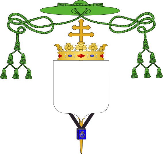 Blason Moderne Vide 3d